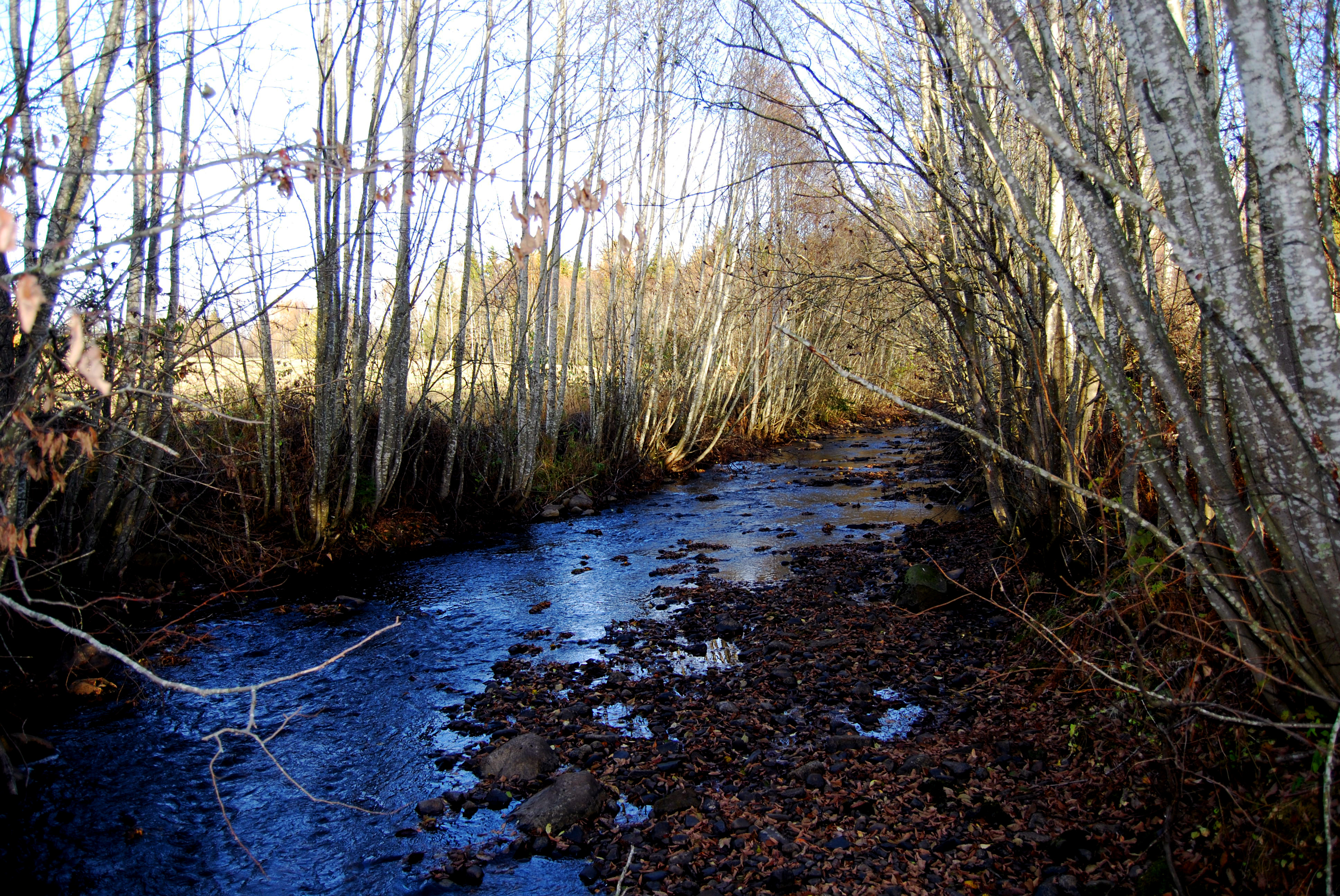 Elva Lageråa. Bildet er tatt i Hamar kommune, ikke langt unna Ilseng gård.